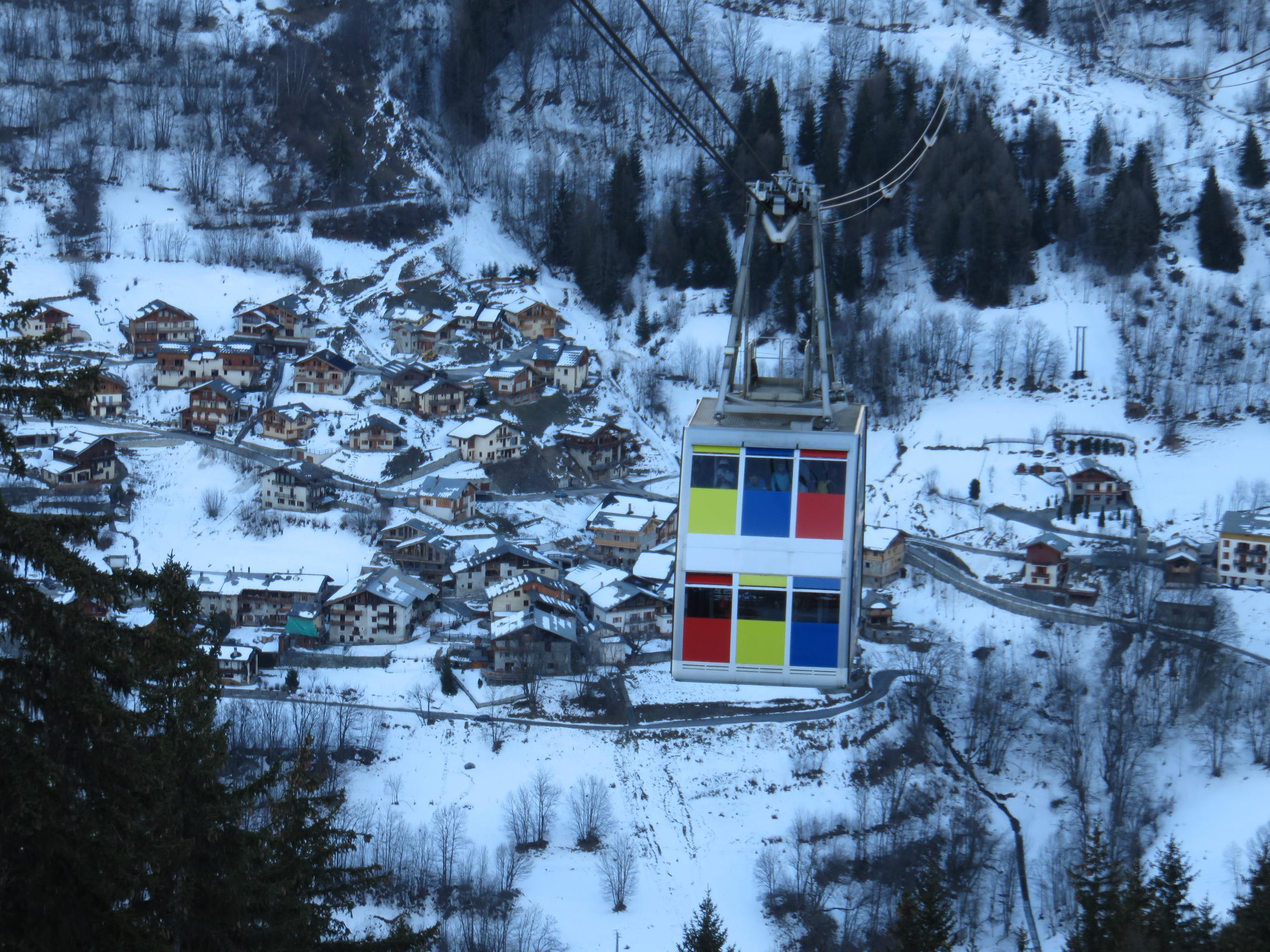 La telepherique Vanoise express